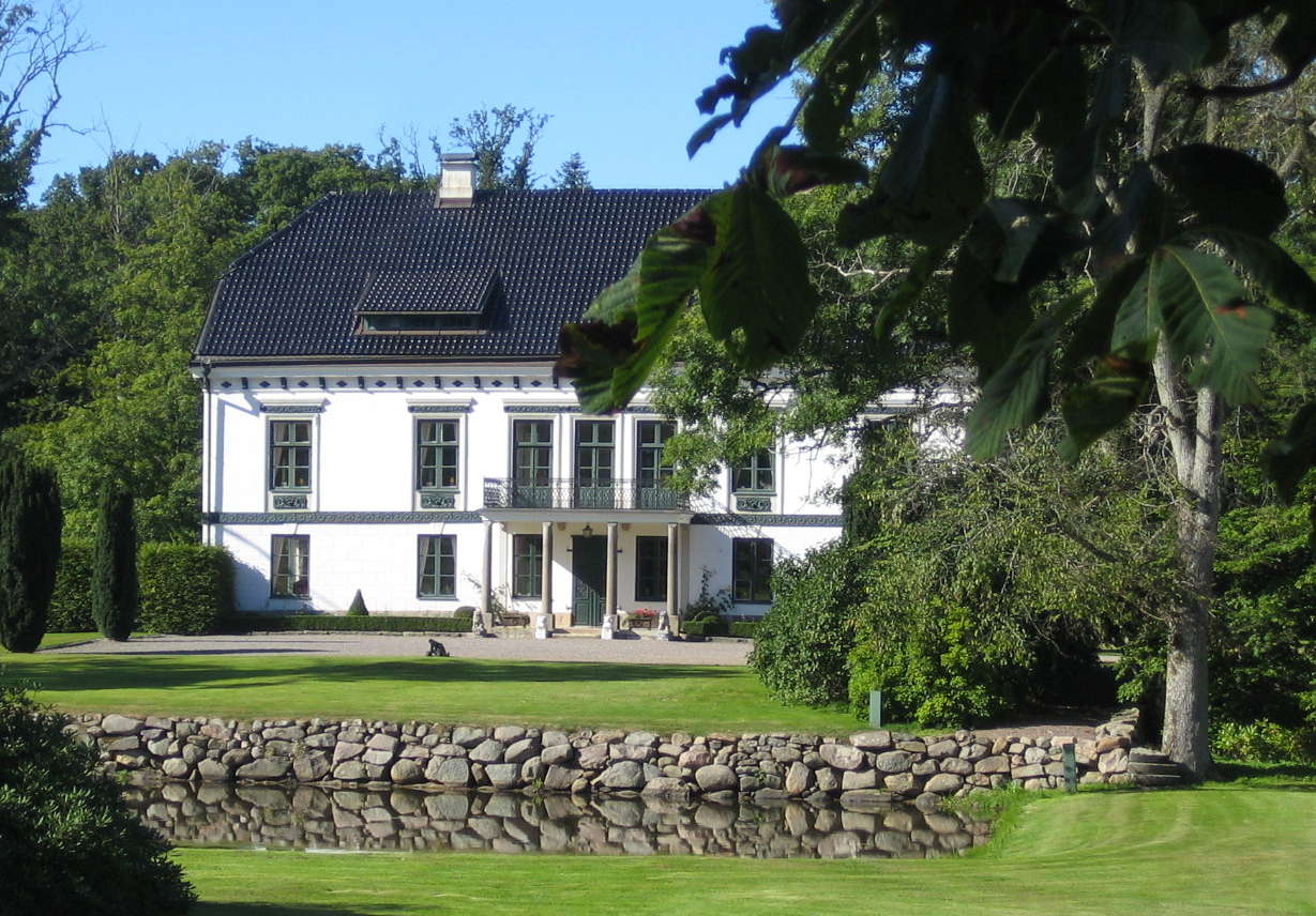 Duveke manor, Skåne, Sweden